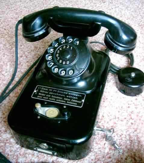 TMünFw55b Teilnehmermünzfernsprecher